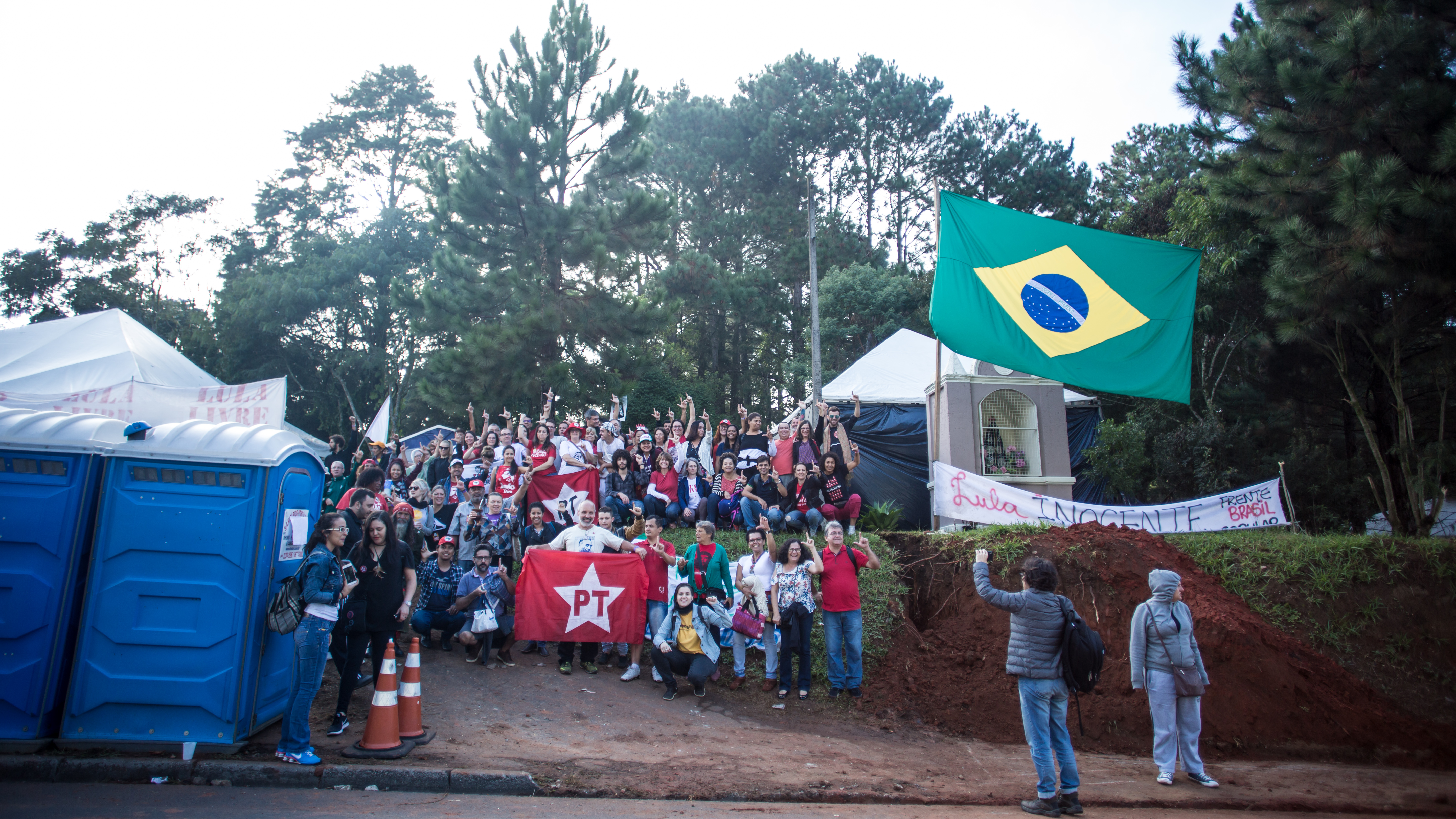 O acampamento Marisa Letícia, mantido em Curitiba desde a prisão do ex-presidente Luiz Inácio Lula da Silva em 7 de abril de 2018